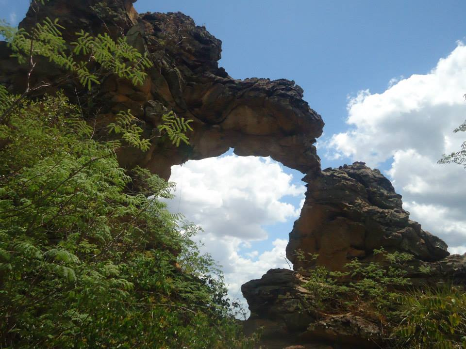 Formação rochosa semelhante a um pássaro que alimenta seu filhote.